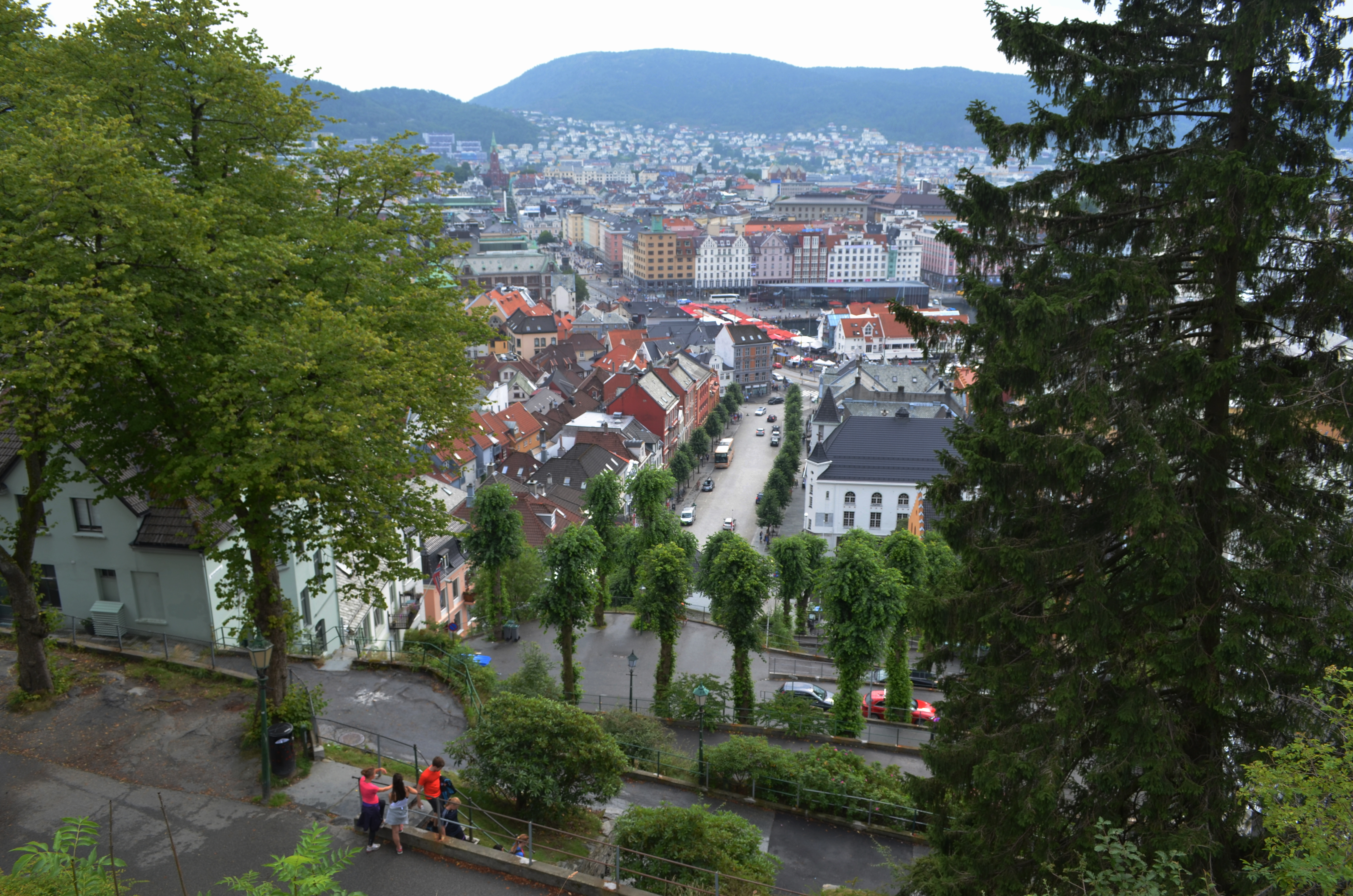 Bergen,Norway